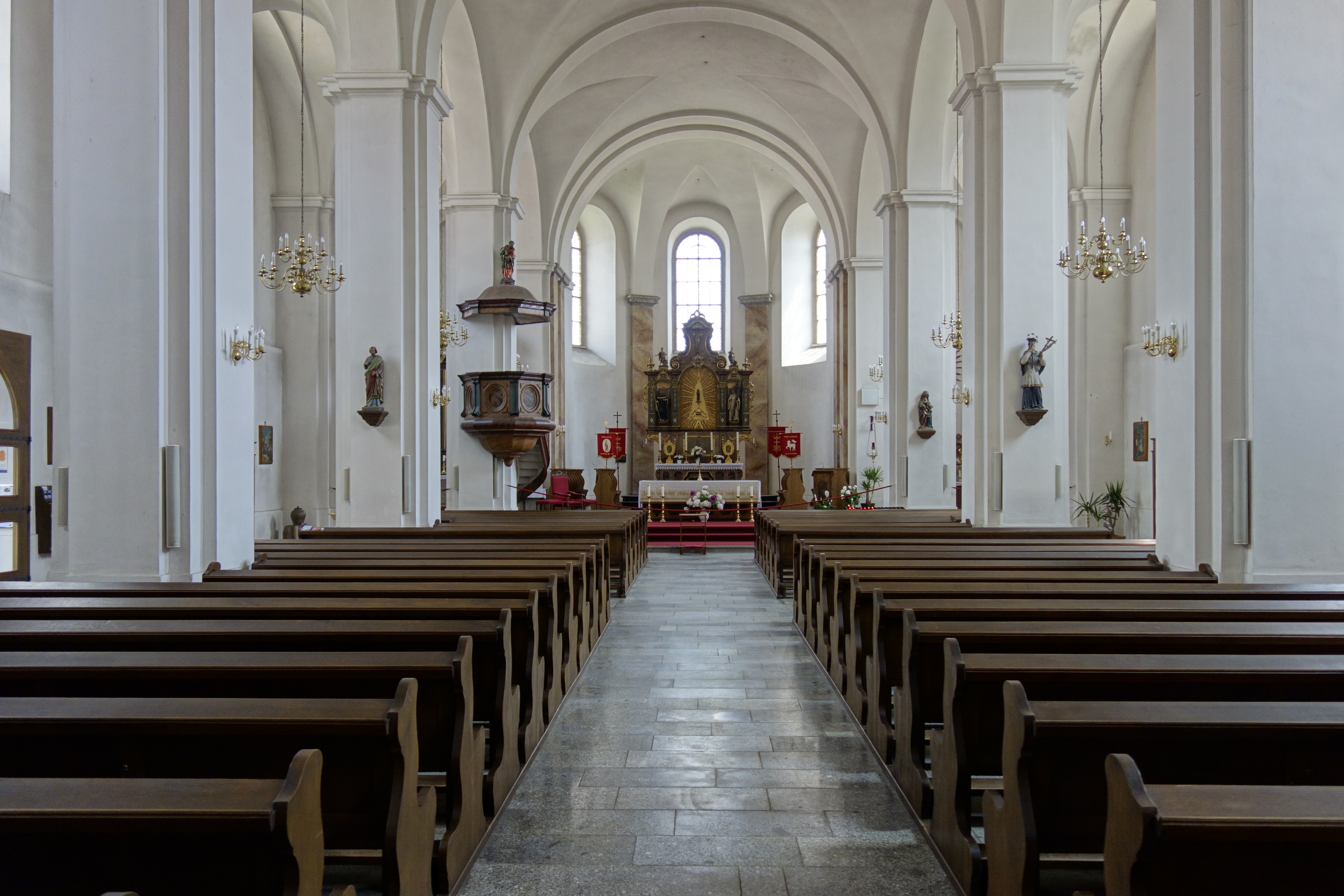 Interior Kirche Rosenthal Juni 2018 (11) Hornjoserbsce: W Róžeńčanskej putniskej cyrkwi